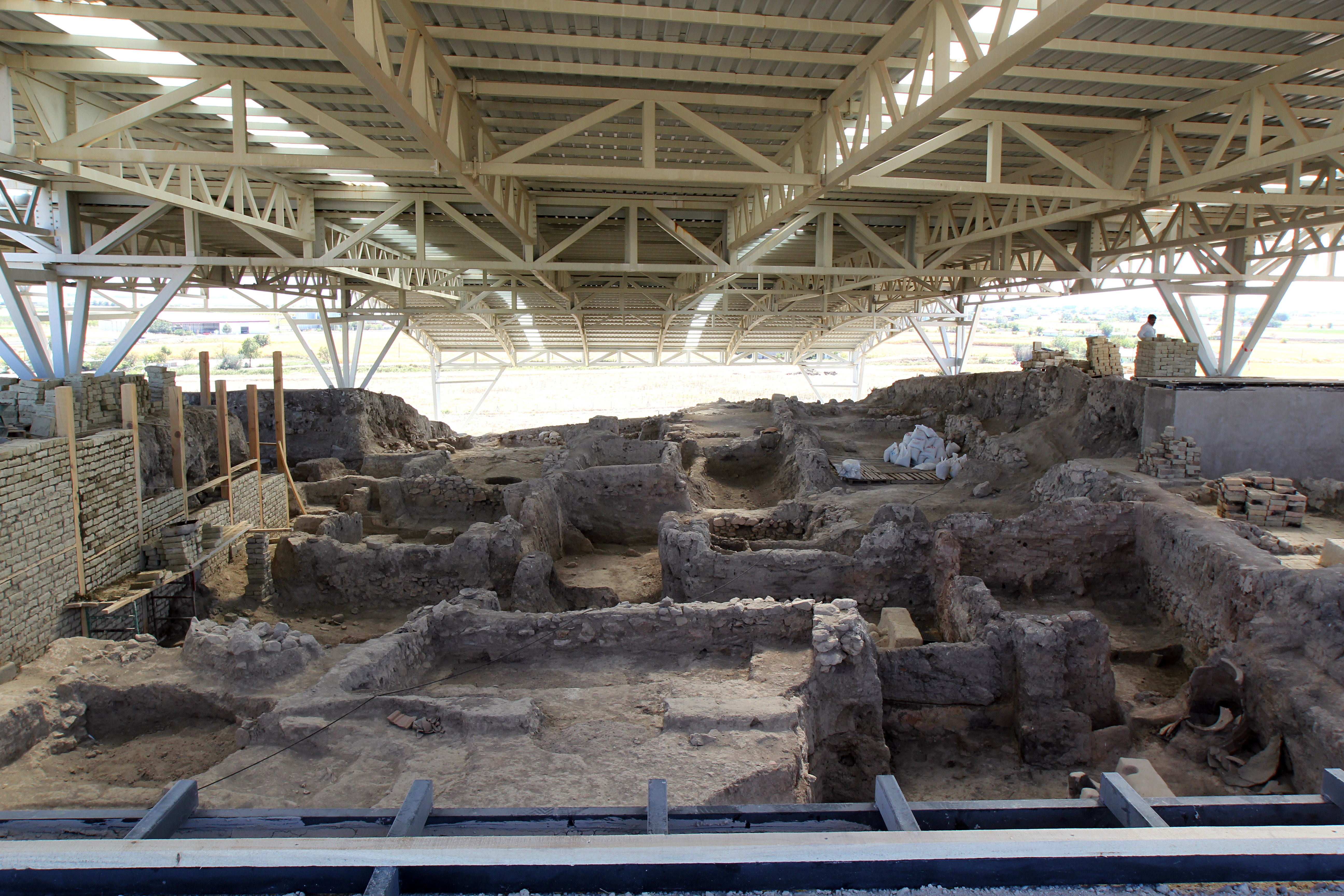 Beycesultan, Siedlungshügel bei Çivril in der westtürkischen Provinz Denizli, bronzezeitliches Grabungsareal